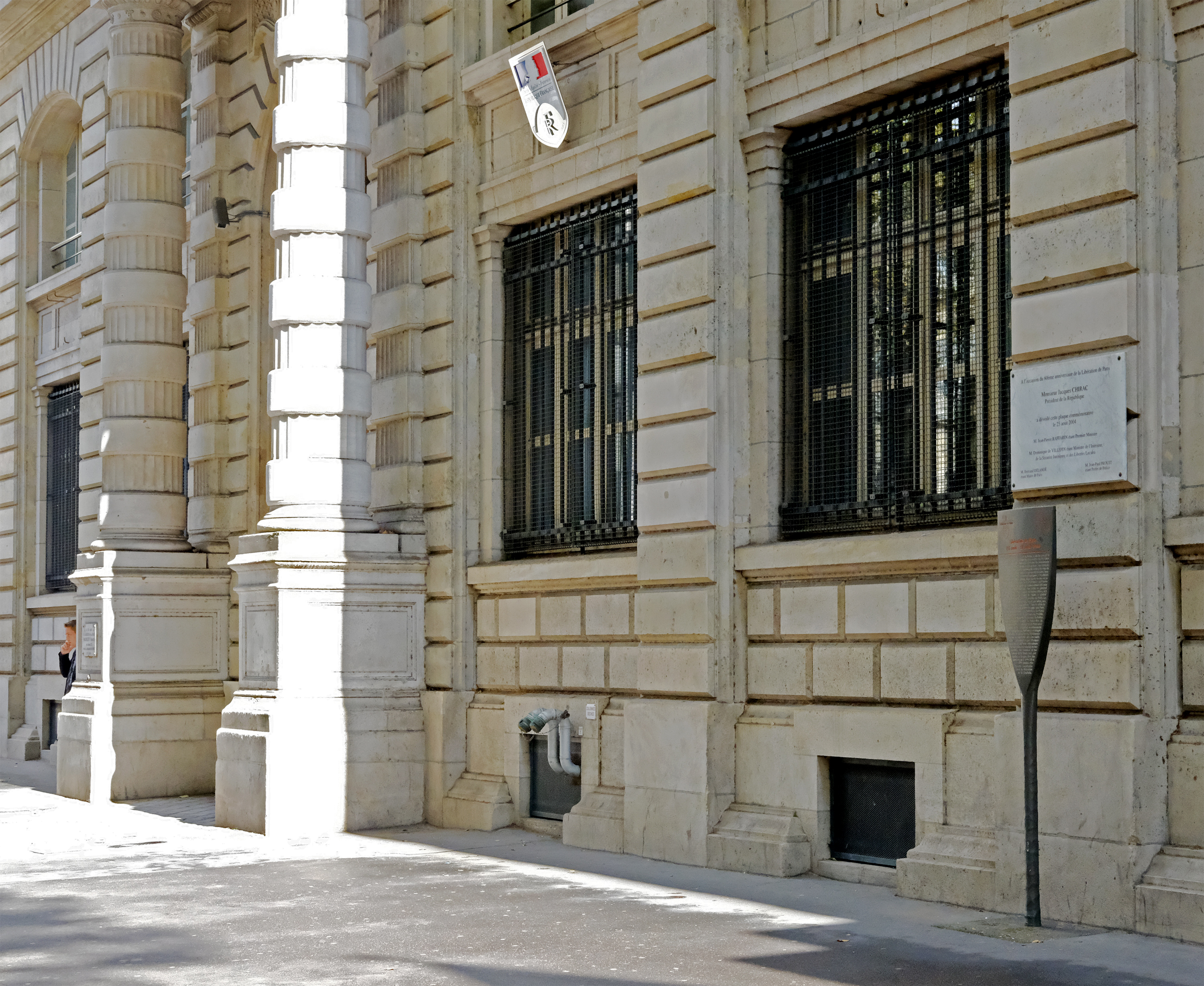 Boulevard du Palais (n°9 : panneau historique de Paris concernant la Libération de Paris en août 1944) - Paris IV